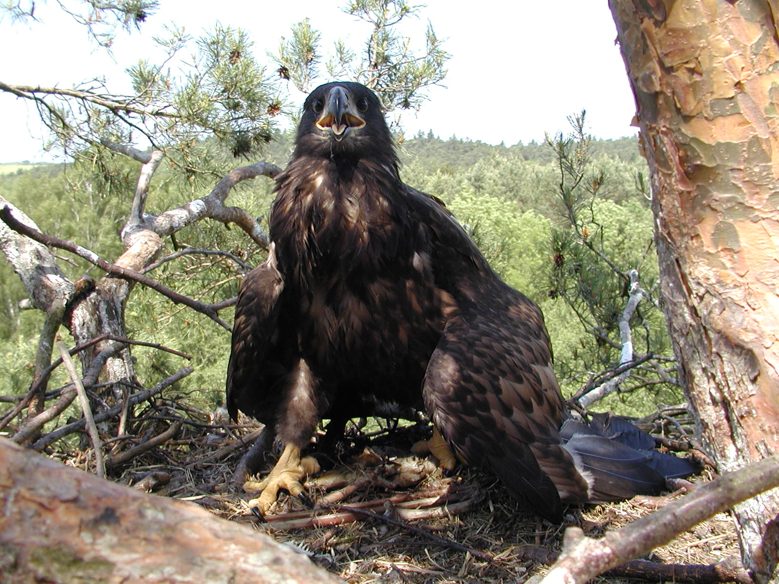 Haliaeetus albicilla, nestling